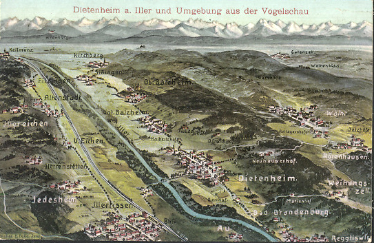 Ansichtskarte Motiv: Dietenheim an der Iller und Umgebung